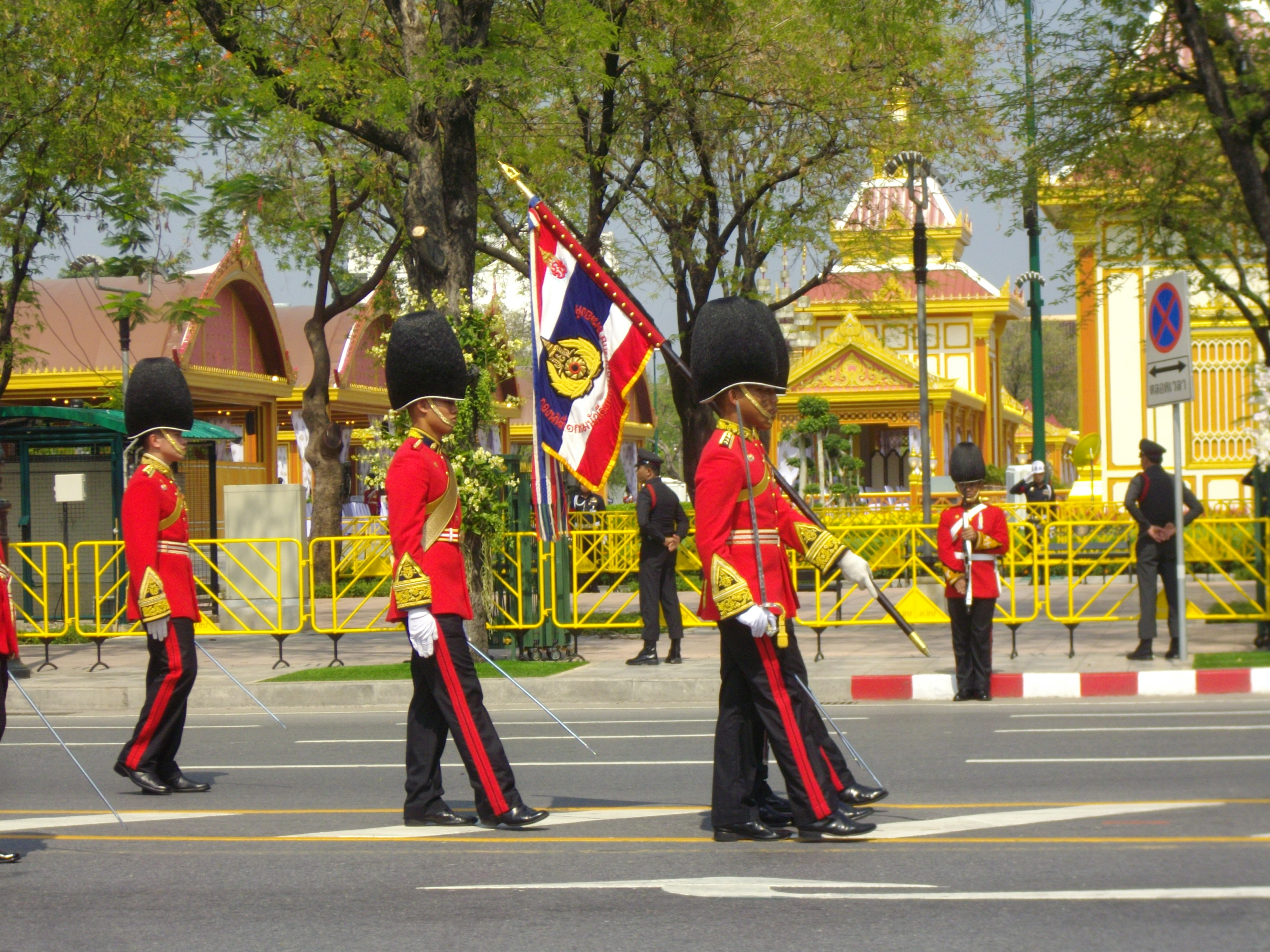 นักเรียนนายร้อยจากกรมนักเรียนนายร้อยรักษาพระองค์ โรงเรียนนายร้อยพระจุลจอมเกล้า ในเครื่องแบบเต็มยศรักษาพระองค์ อัญเชิญธงชัยเฉลิมพล นำกองพันทหารเกียรติยศ ในริ้วกระบวนพระอิสริยยศสำหรับพระศพ สมเด็จพระเจ้าภคินีเธอ เจ้าฟ้าเพชรรัตนราชสุดา สิริโสภาพัณณวดี ระหว่างการอัญเชิญพระศพด้วยพระมหาพิชัยราชรถ จากหน้าวัดพระเชตุพนวิมลมังคลาราม ไปยังพระเมรุท้องสนามหลวง วันที่ 9 เมษายน พ.ศ. 2555